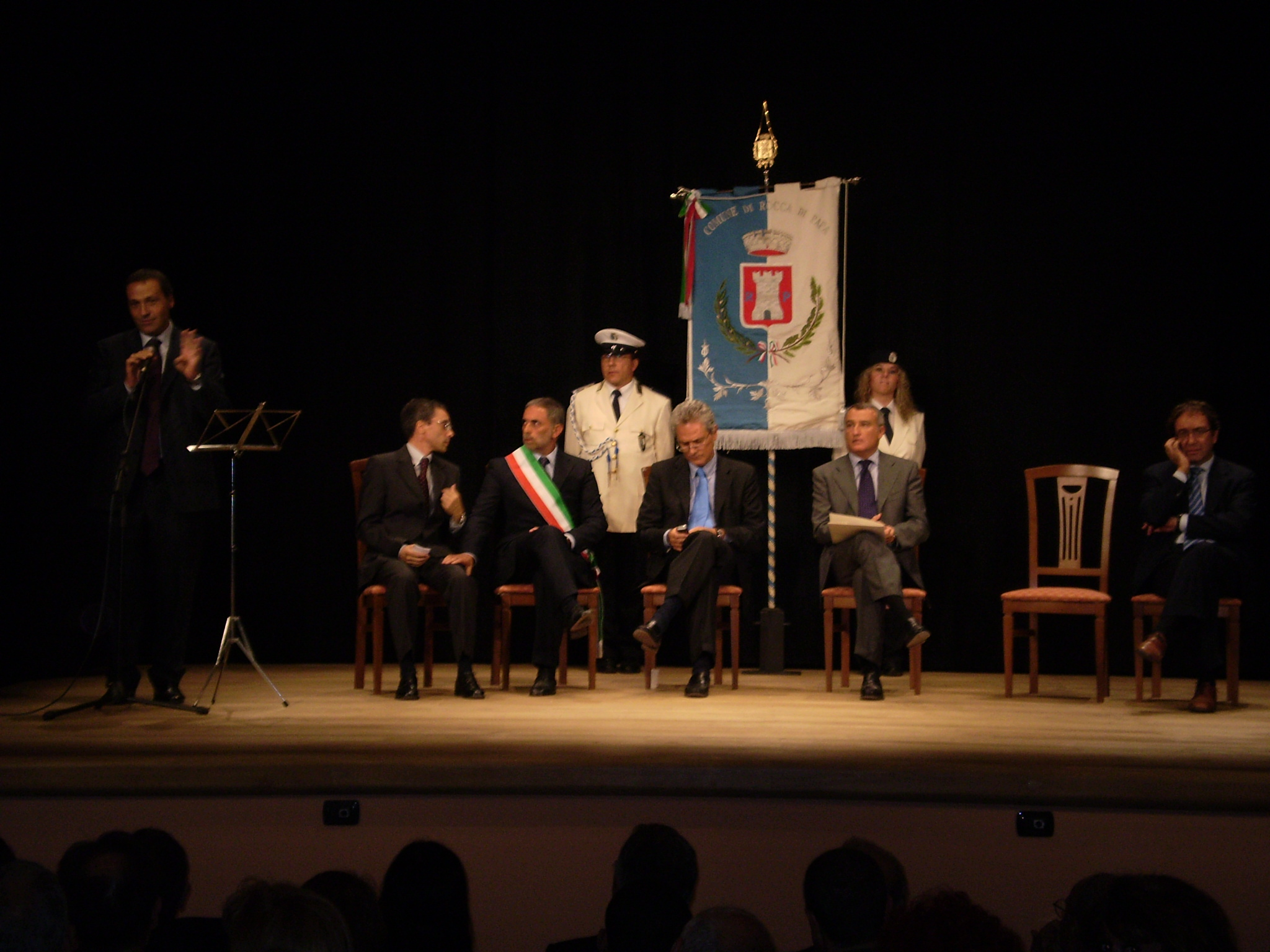 Il ministro dei beni culturali, Francesco Rutelli, all'inaugurazione del teatro comunale di Rocca di Papa (2007)